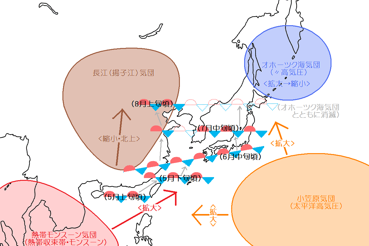 梅雨の説明。4つの気団と梅雨前線の関係、ジェット気流の流路などを記している。